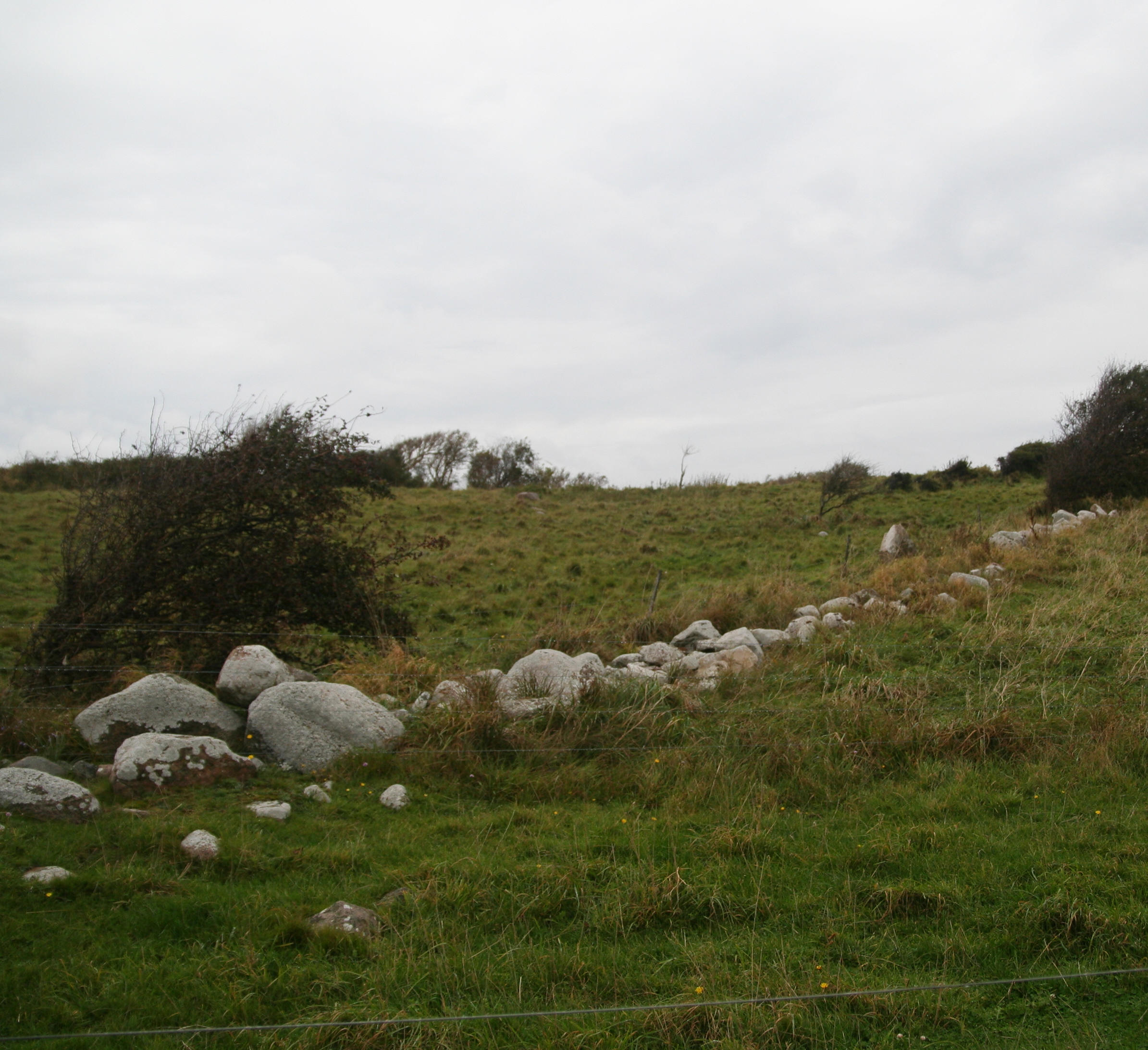 Fyns Hoved, Denmark